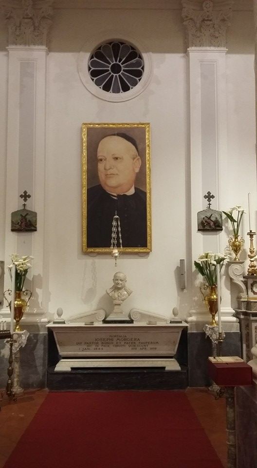 Tomba del Venerabile don Giuseppe Morgera, il "Parroco Santo", nella Chiesa Madre di Casamicciola